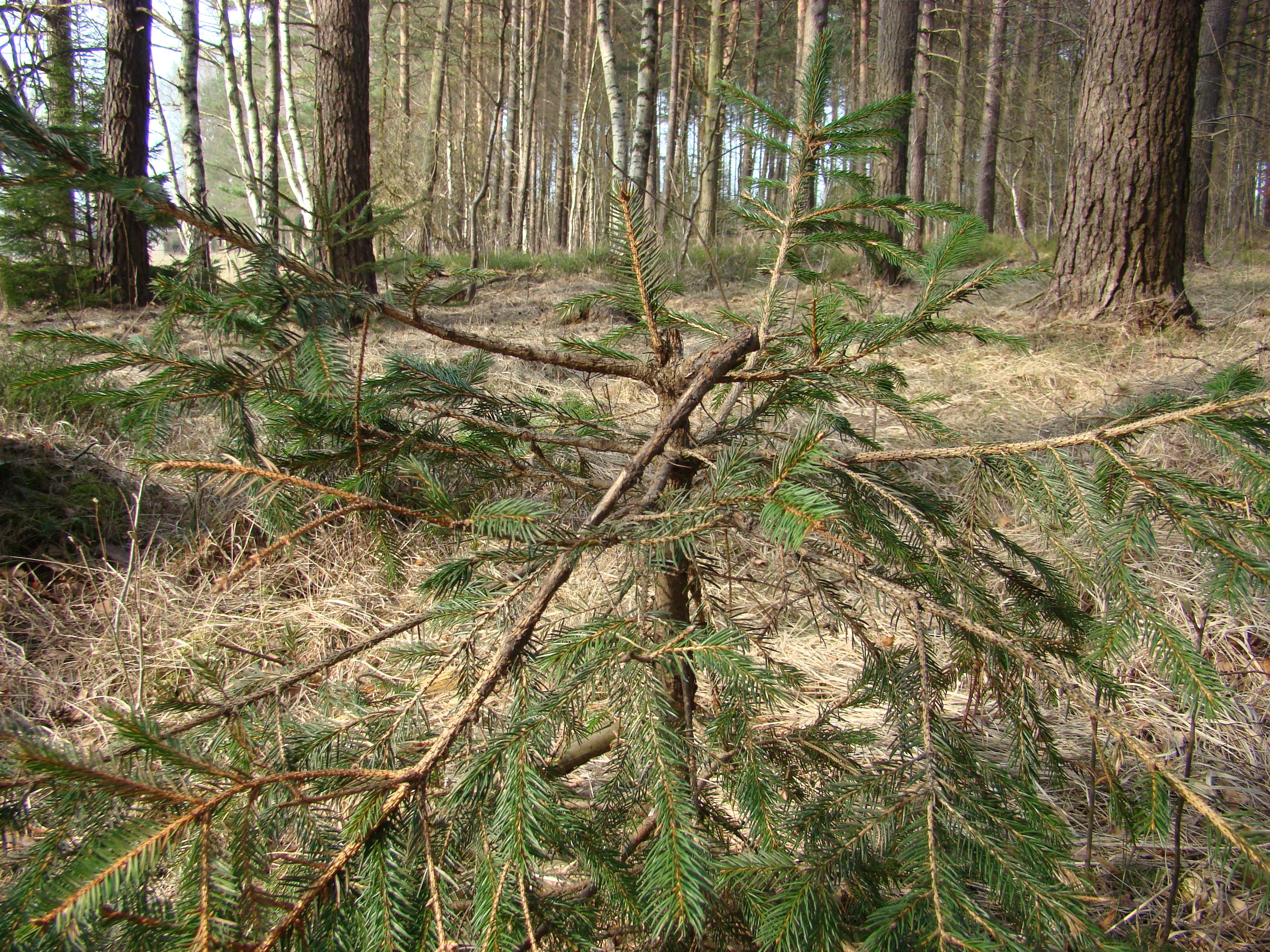 Wildverbiss an einer Fichte